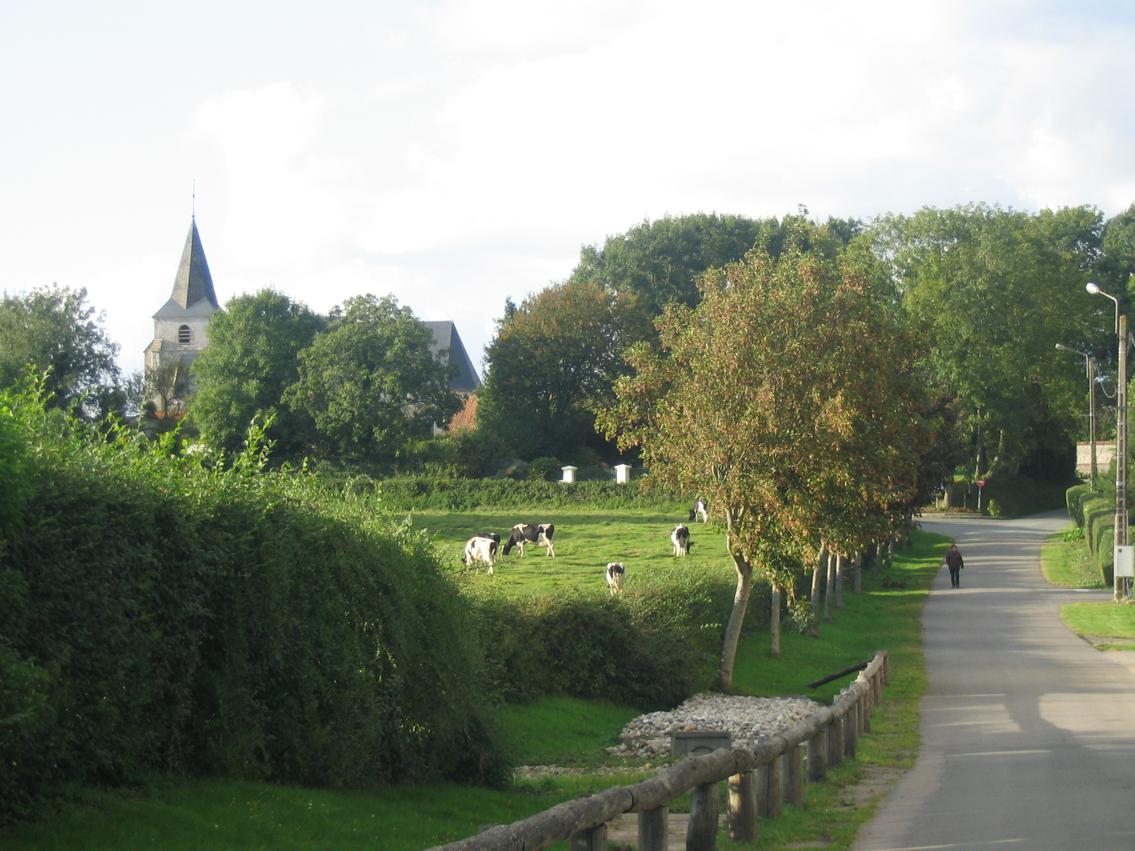 Chemin des Lombards menant à l'église